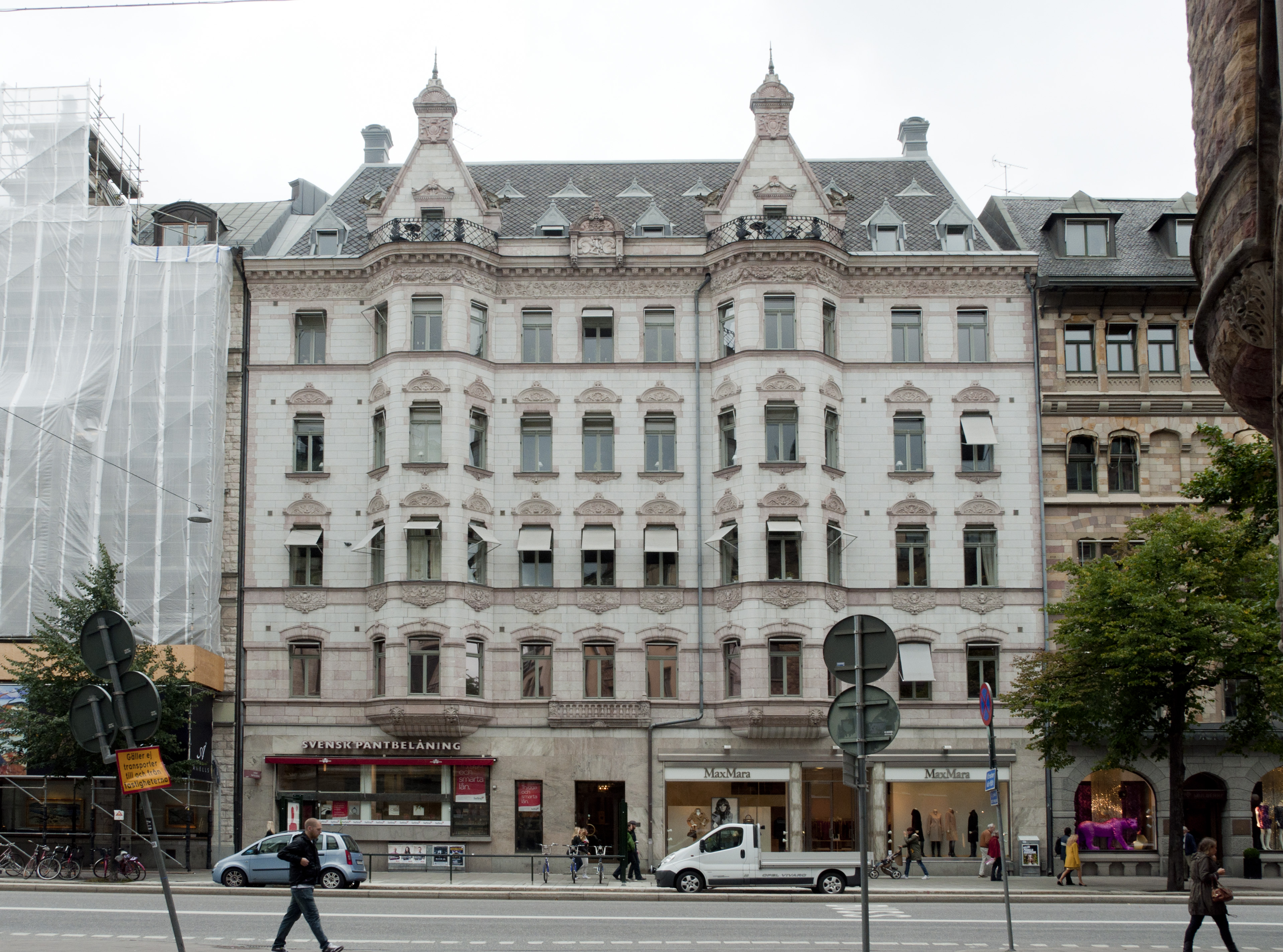 Birger Jarlsgatan 12, Stockholm. Byggnadsår 1896-97, arkitekt C Kleitz, byggherre M Magnusson, byggmästare H Bergkvist.